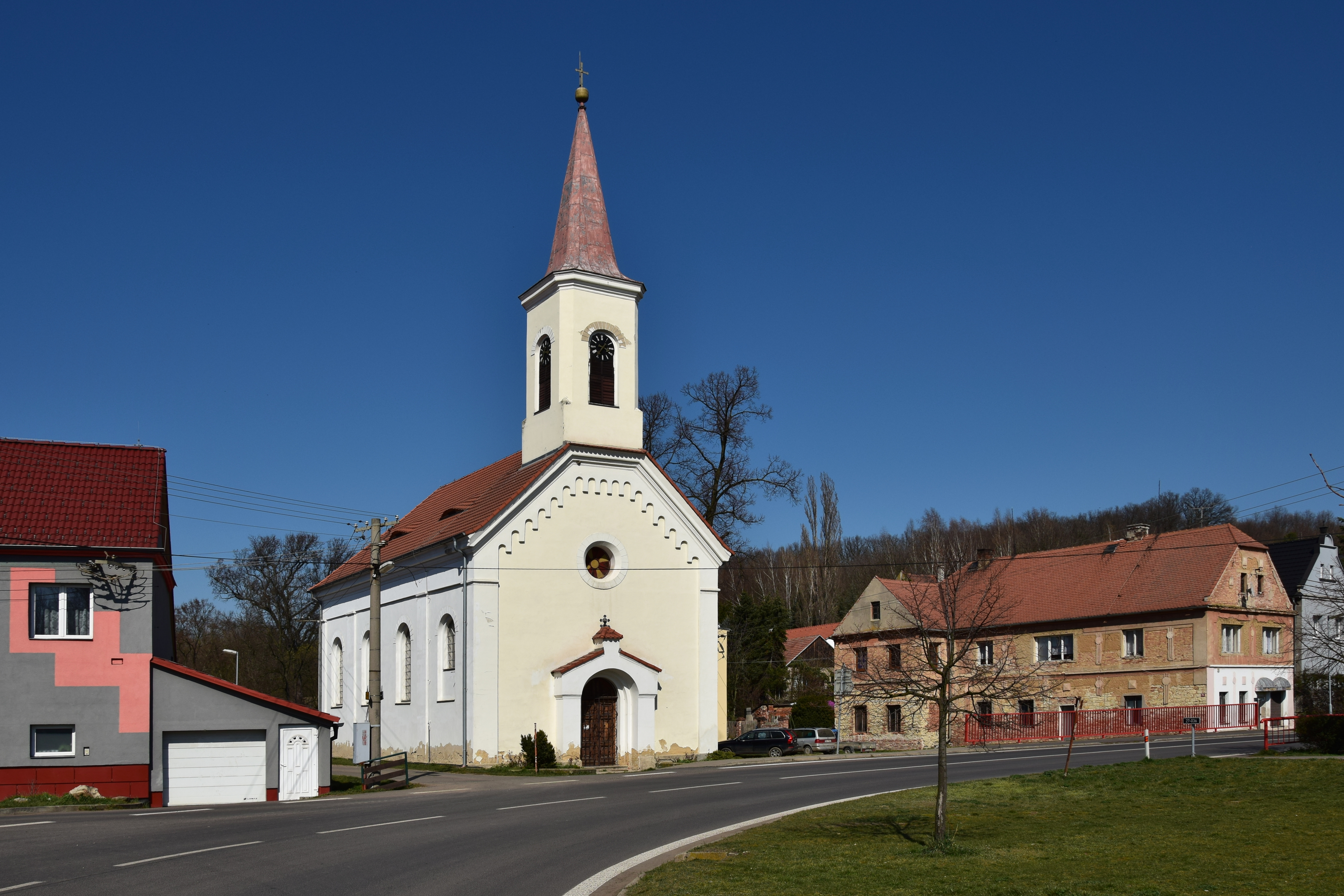 Velemyšleves – kaple svatého Antonína na návsi